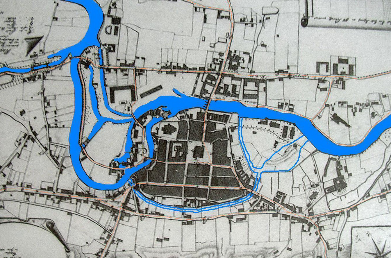 Plan Bydgoszczy porucznika von Lindnera z 1800 r.